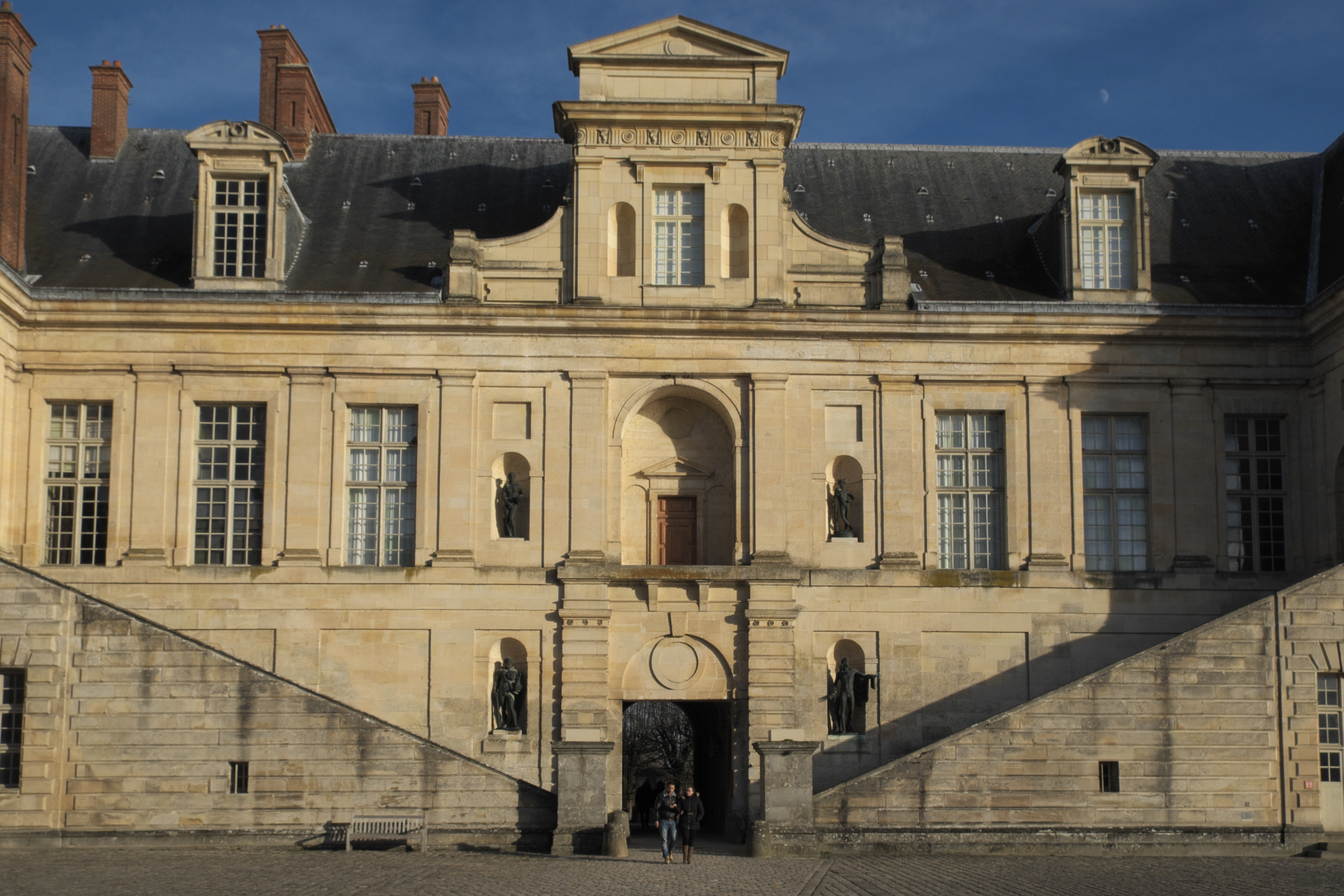 Schloss Fontainebleau in Fontainebleau im Département Seine-et-Marne in der Region Île-de-France (Frankreich), Fassade zur Cour de la Fontaine (Brunnenhof)